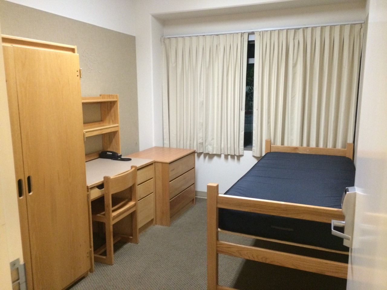 UCLA Hedrick Summit Single Room